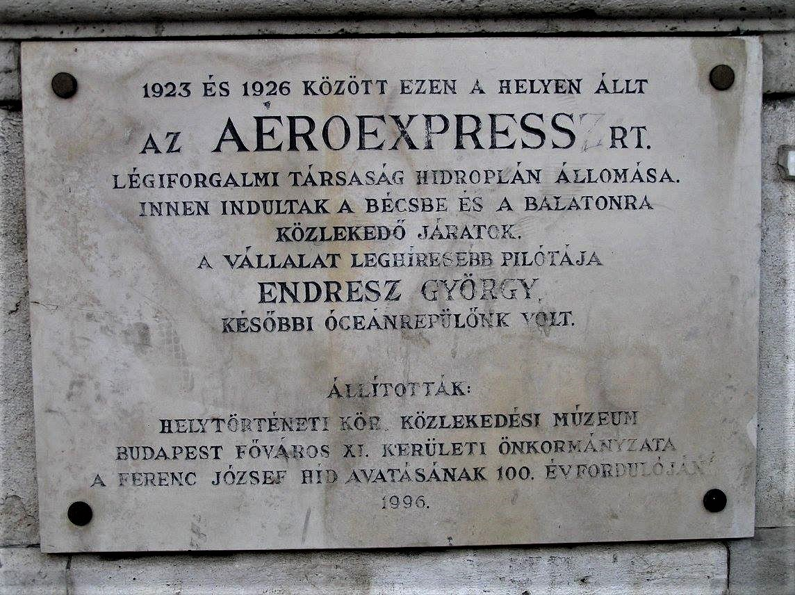 Az Aéroexpressz Rt. emléktáblája Budapesten, XI. kerület